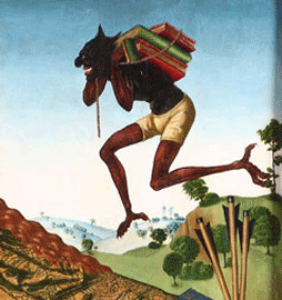 Recorte da obra Diego de la Cruz: Nossa Senhora das Mercês (c. 1485), Burgos, Abadia de Santa María la Real de Las Huelgas. Titivillus aparece na parte superior da imagem, à direita, carregando livros